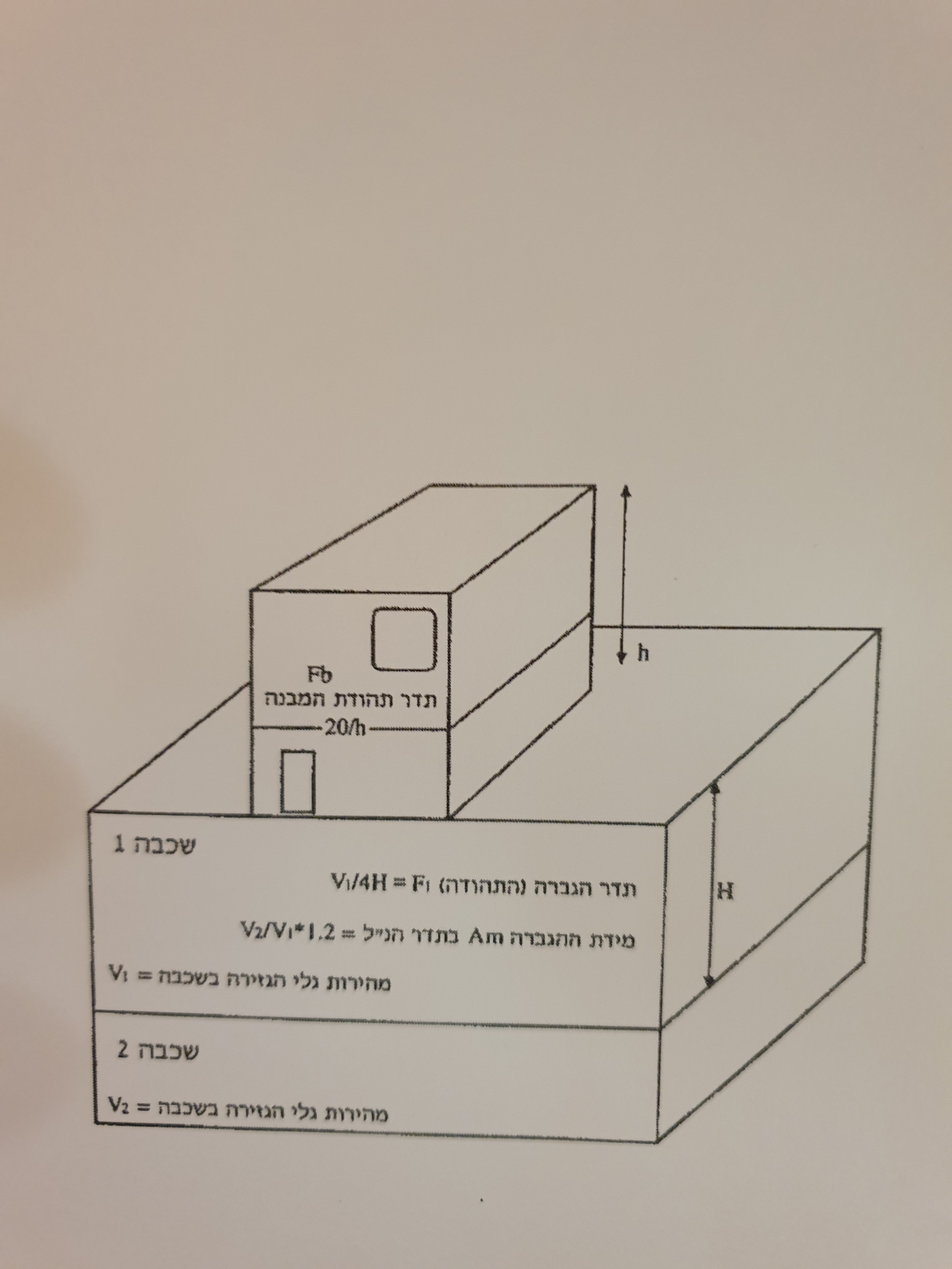 Amplification Model of Ground Acceleration in a Site